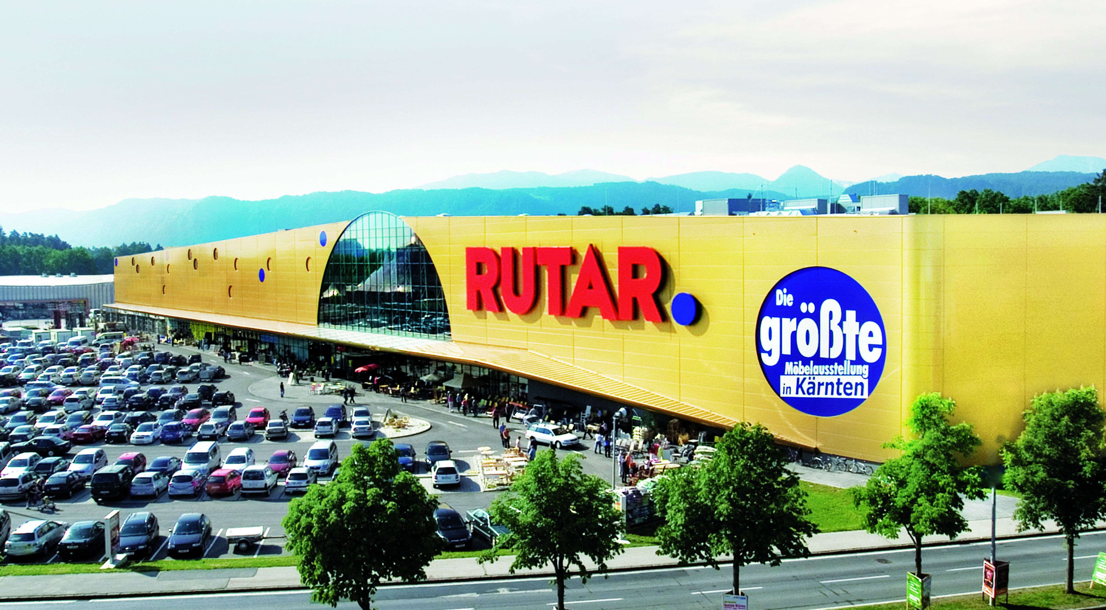 Rutar KL